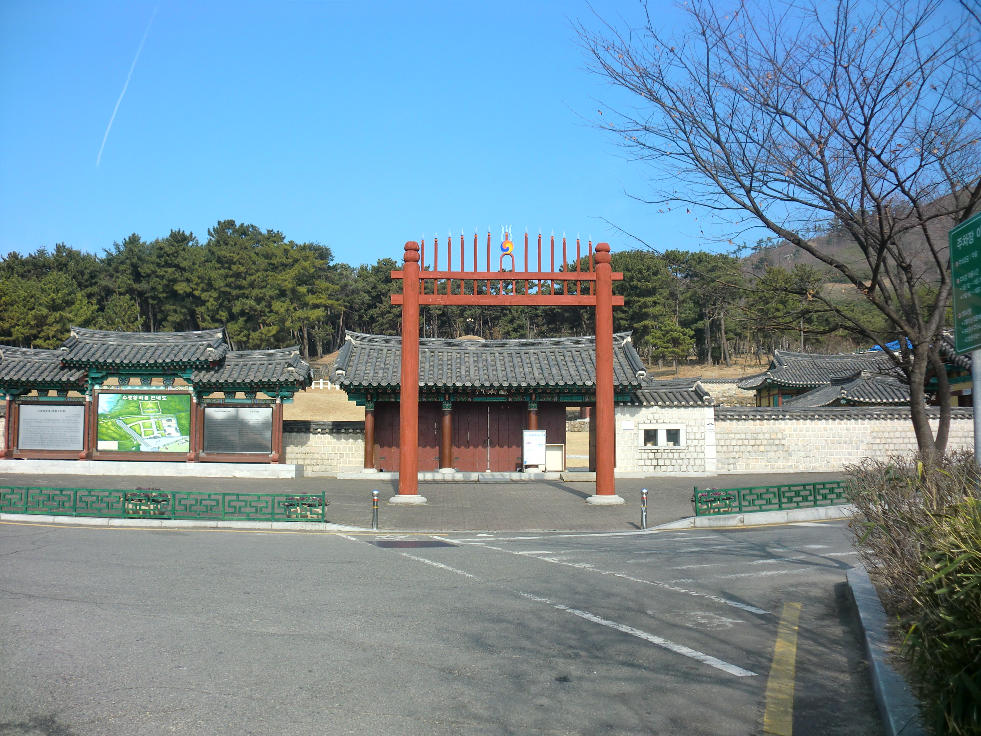 수로왕비릉